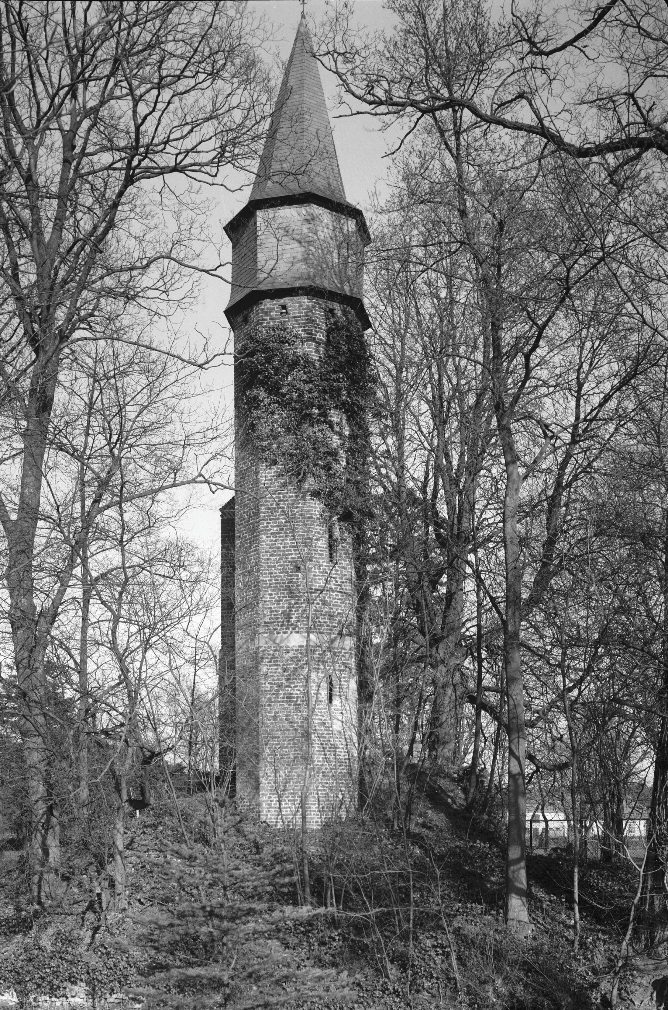 Voormalig Klooster Sint Elisabeth - Sint Elisabetsdal: torentje